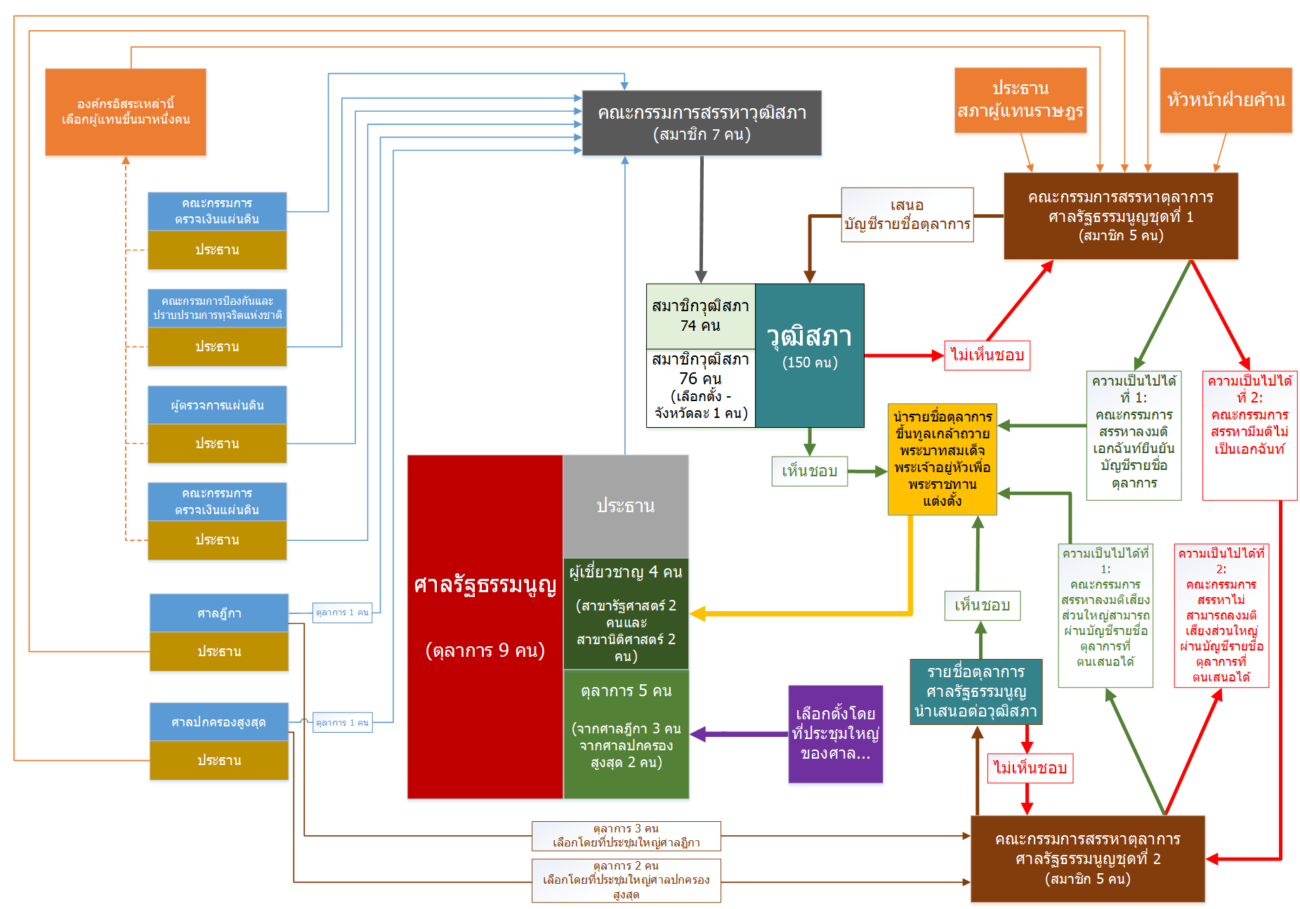 แผนผังแสดงโครงสร้างและที่มาของศาลรัฐธรรมนูญตามรัฐ ธรรมนูญพ.ศ. 2550